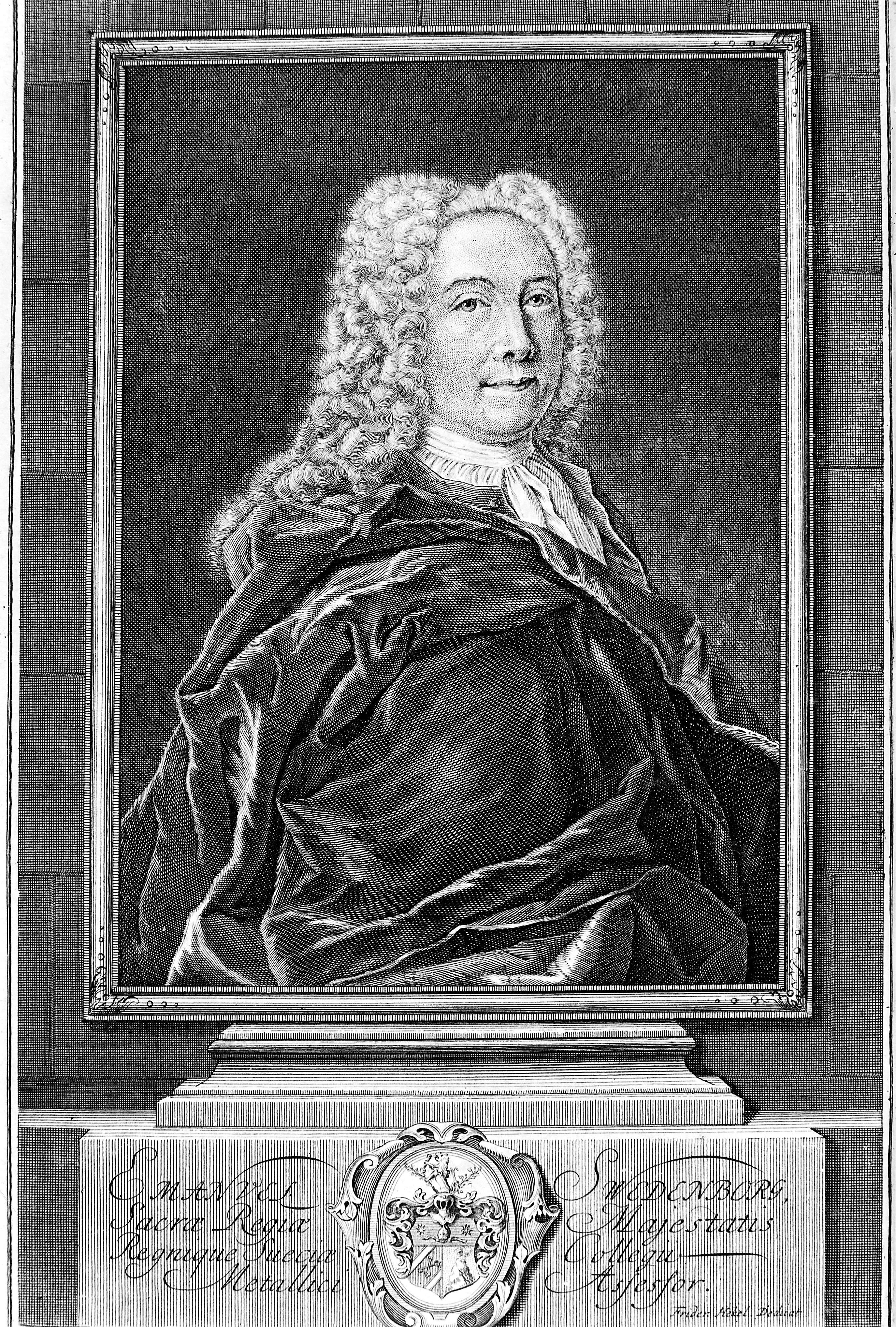 Emanuel Swedenborg. Wellcome Images Keywords: Emanuel Swedenborg